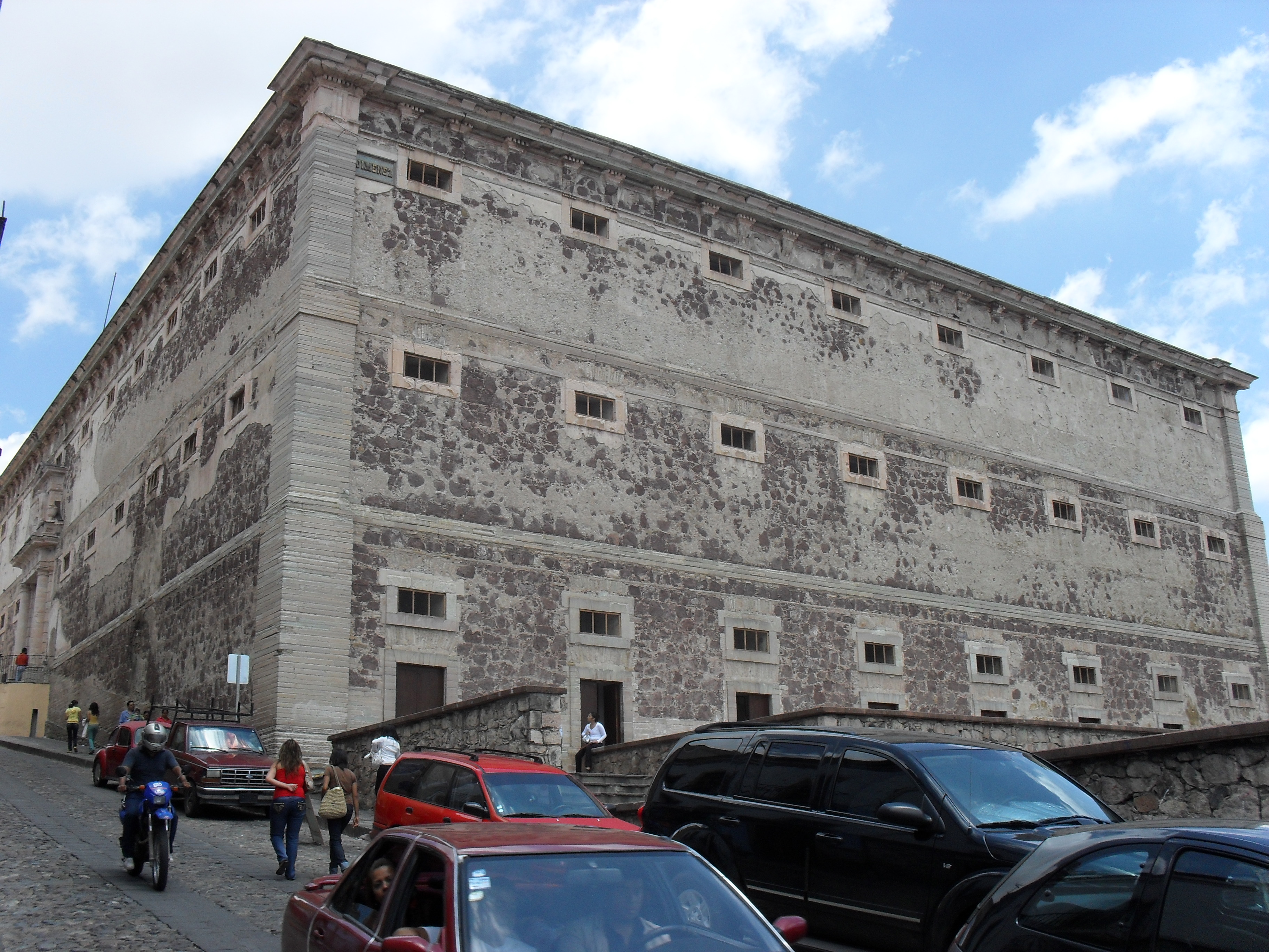 Imagen tomada del exterior de la Alhóndiga de Granaditas, en el Estado de Guanajuato, México